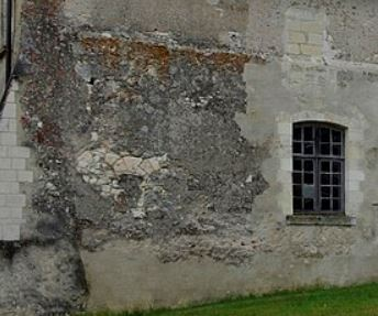 Traces ancien bâtiment roman.